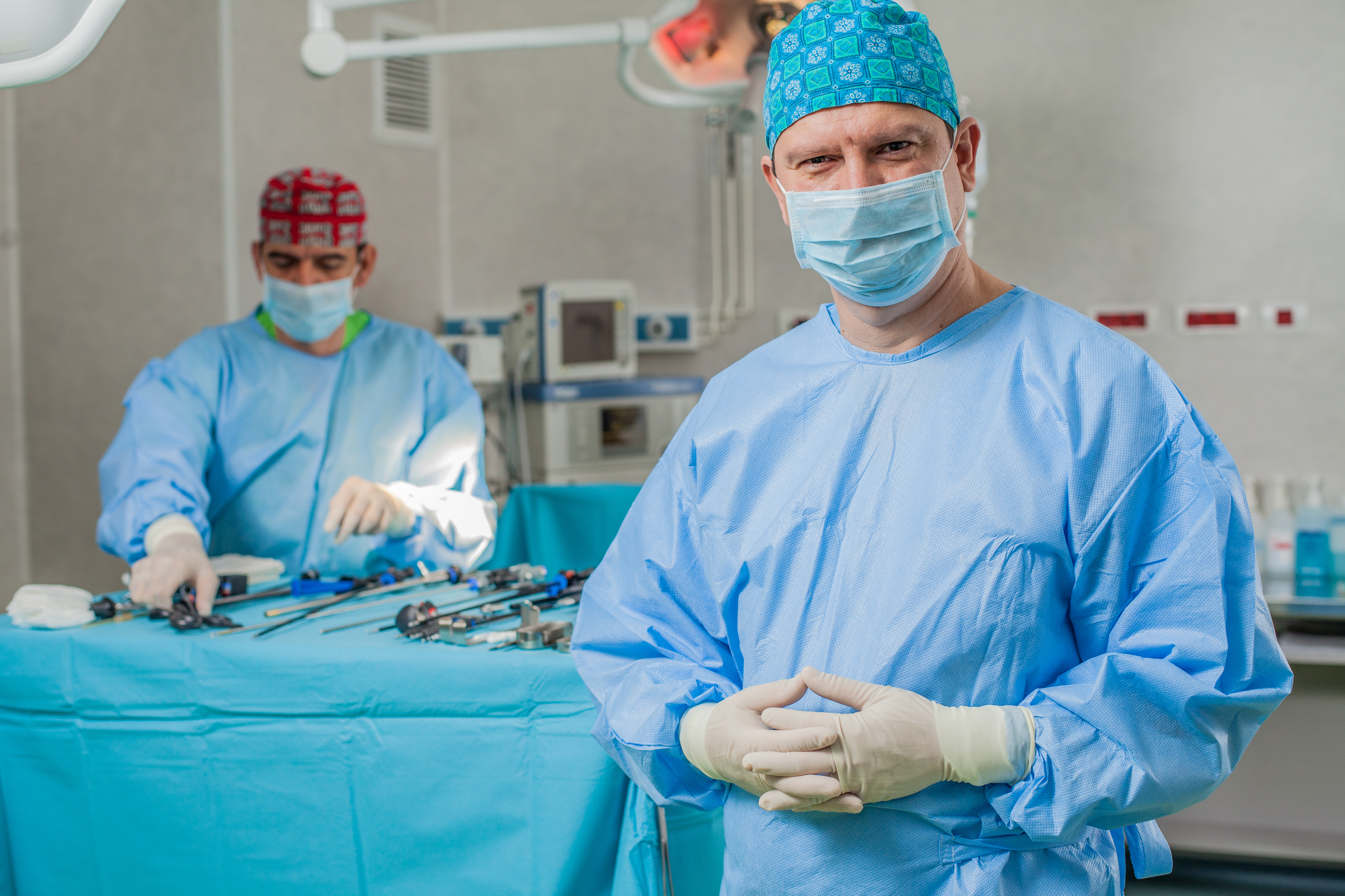 Medic primar, obstetrica-ginecologie